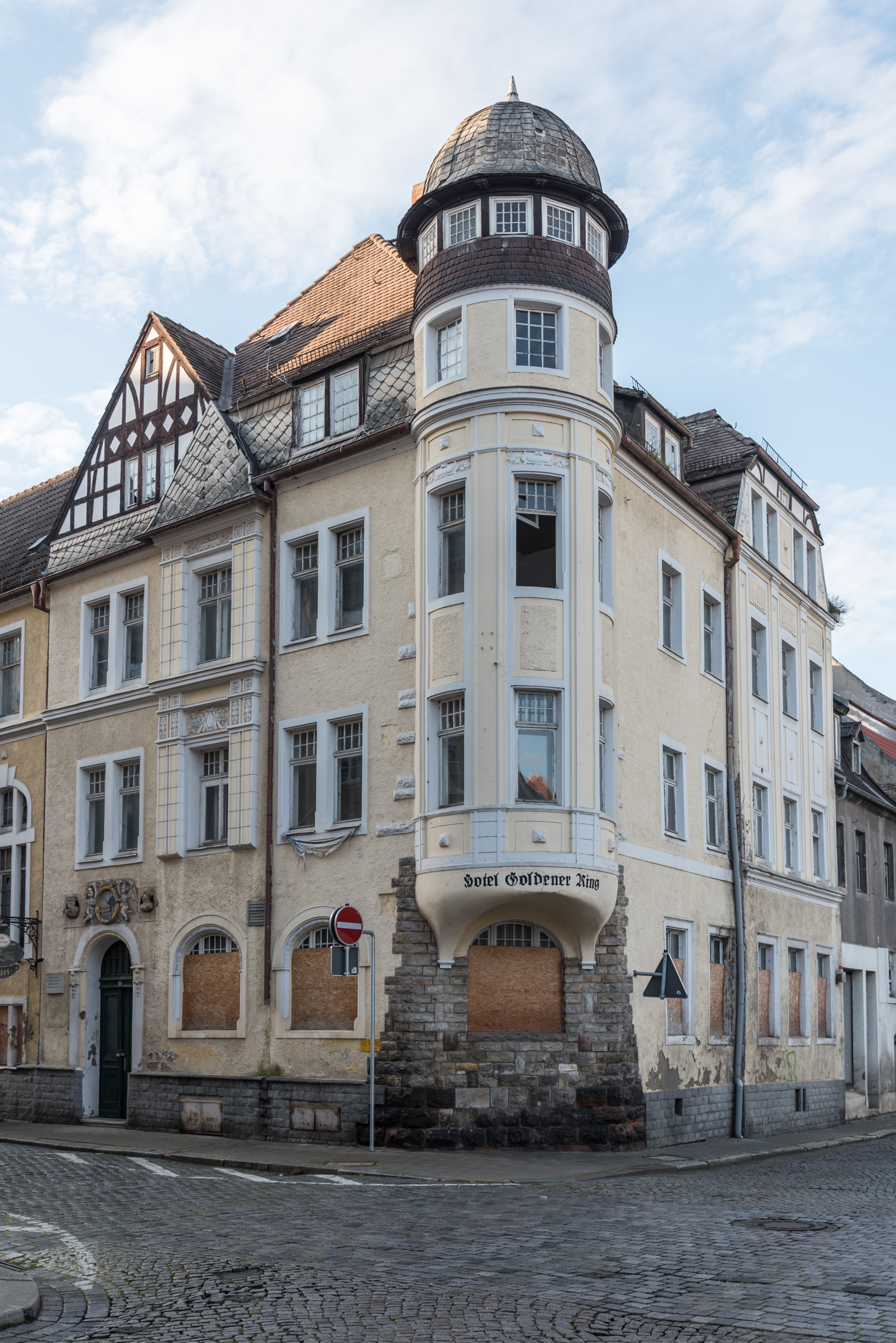 Weißenfels, Jüdenstraße 51, Goldener Ring